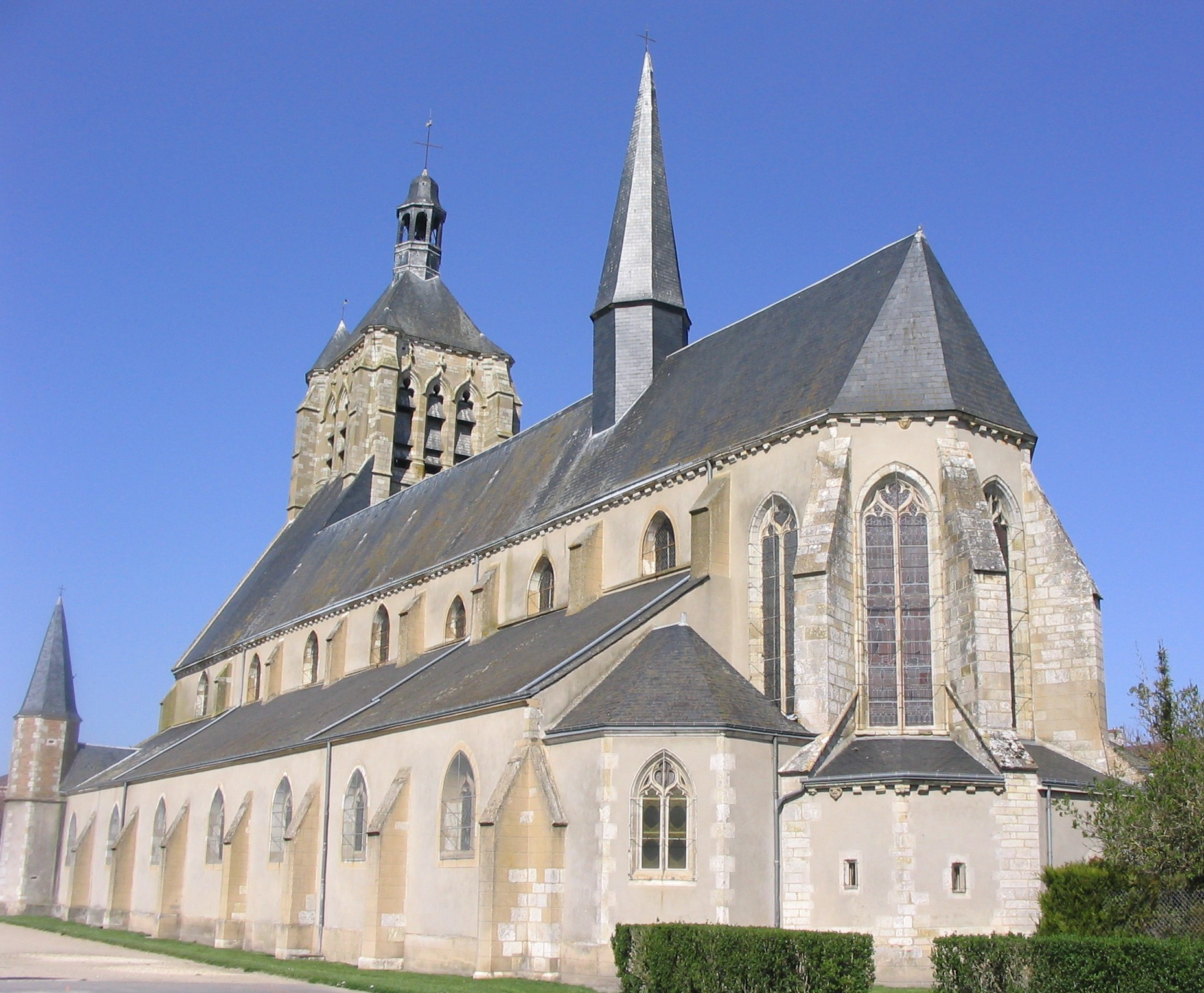 Church Saint-Symphorien de Neuville-aux-Bois Loiret Centre France